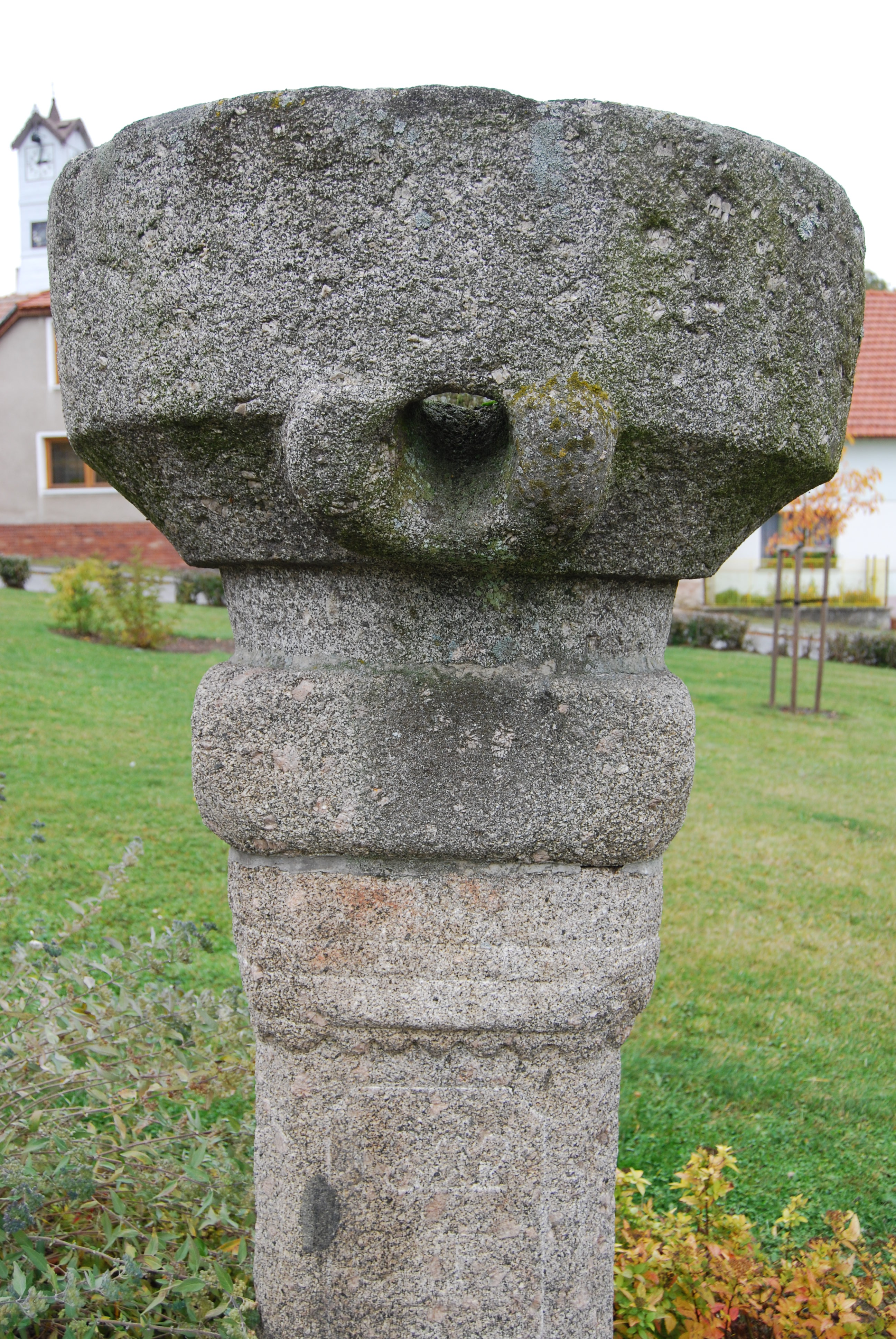 Detail horní části kamenného korce. Krásná Hora nad Vltavou. Okres Příbram. Česká republika.